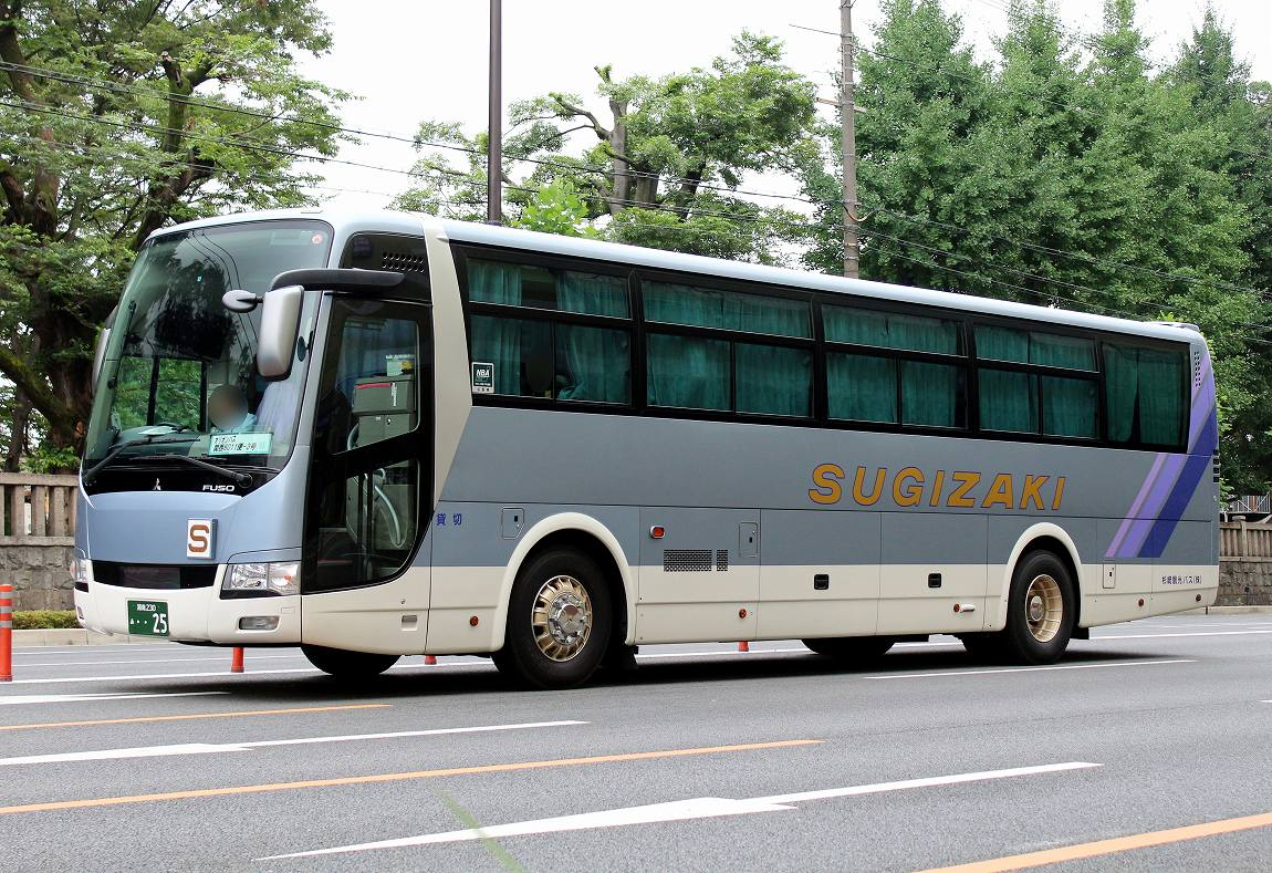 貸切観光バス